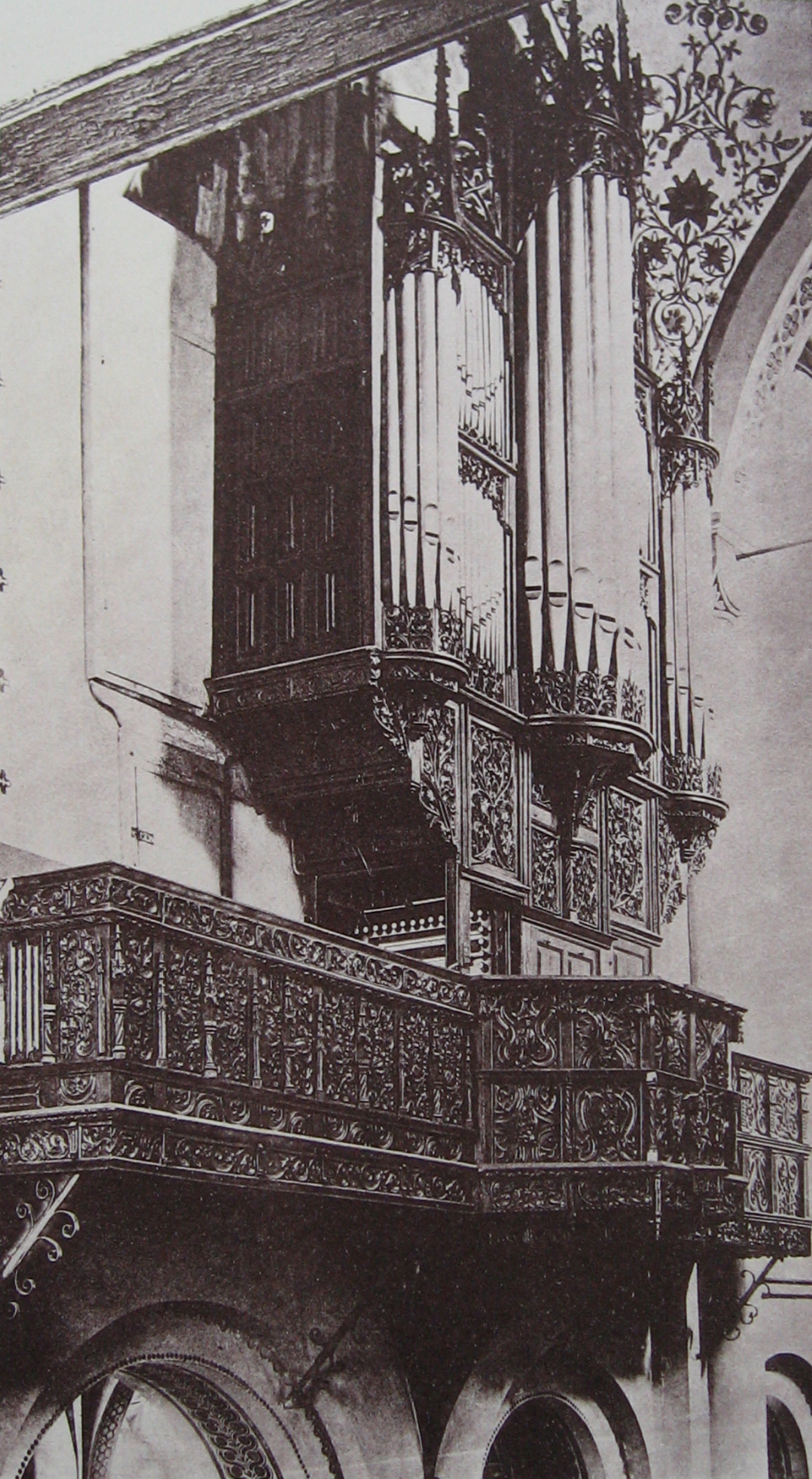 Marienkirche Dortmund Orgel 1894